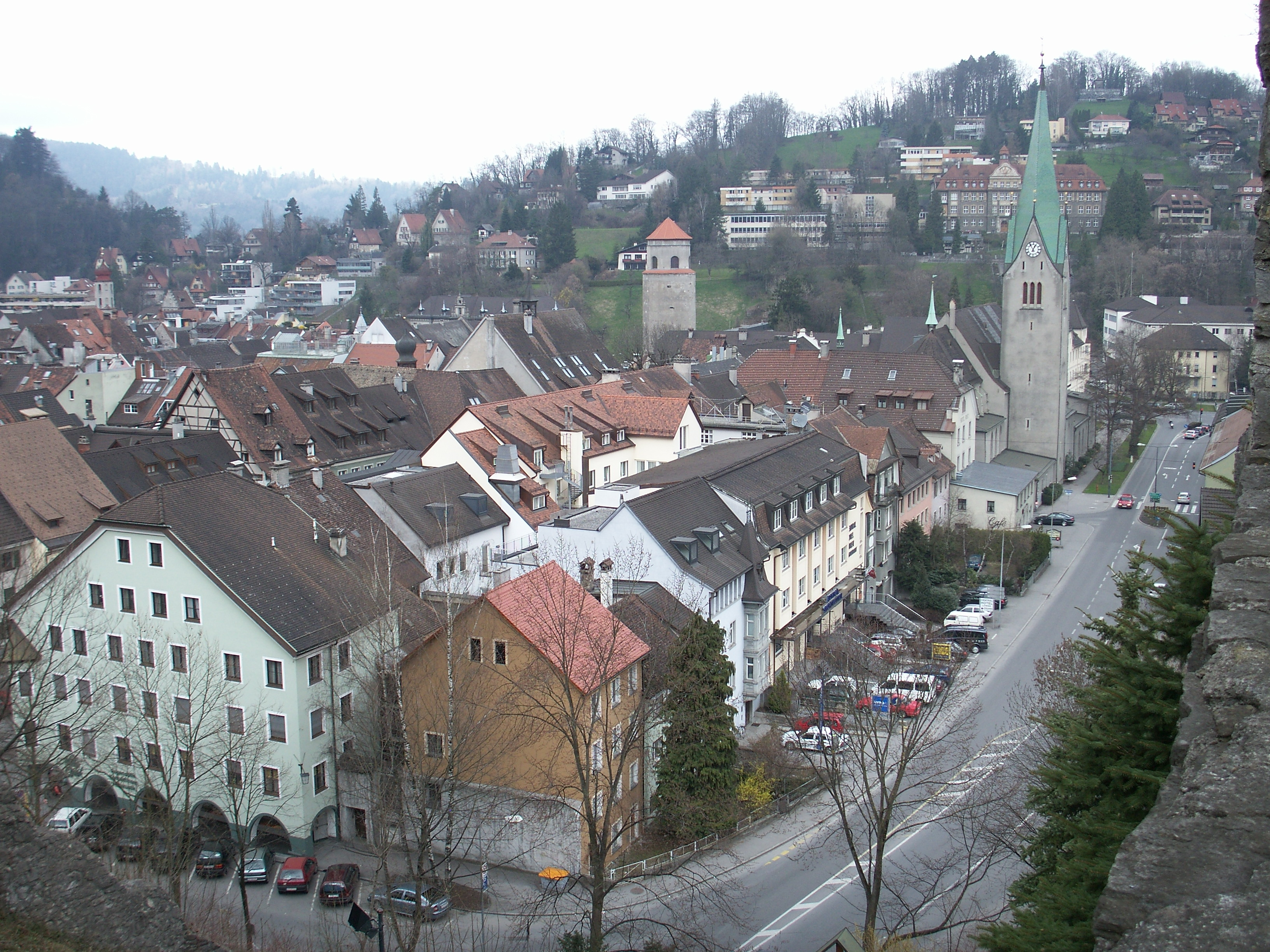 Feldkirch, Straße: Schloßgraben, mit Dompfarrkirche St. Nikolaus